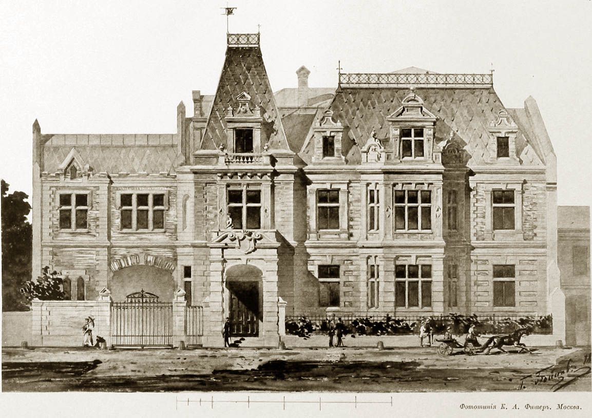 Povarskaya Street, 52, by Pyotr Boytsov